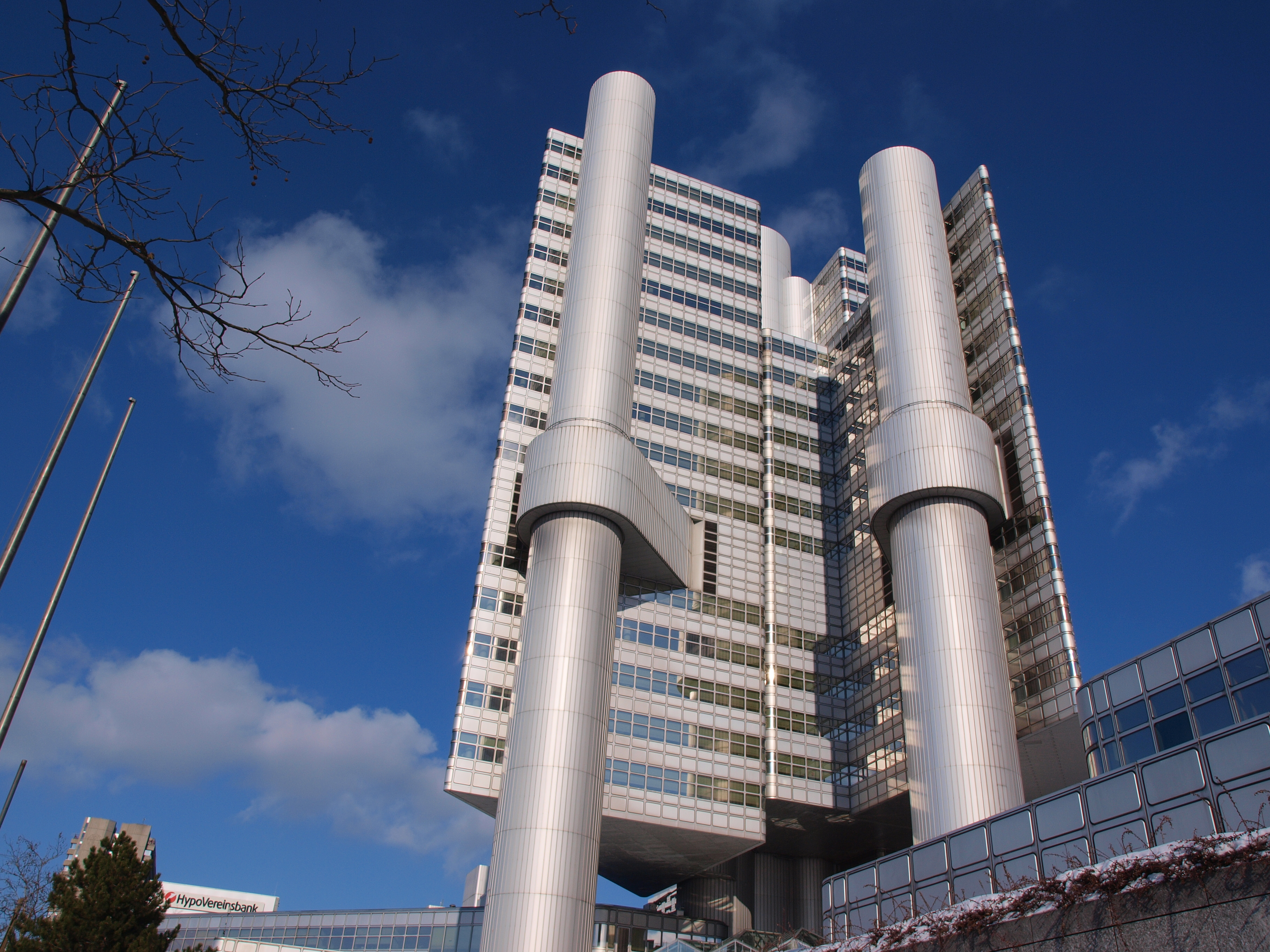 Hypo-Haus in Munich